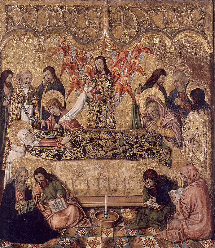 La obra representa el tránsito o la dormición de la Virgen María, madre de Jesucristo y elevada en cuerpo y alma a los cielos.